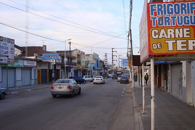 Localidad Tortuguitas, Buenos Aires, Argentina